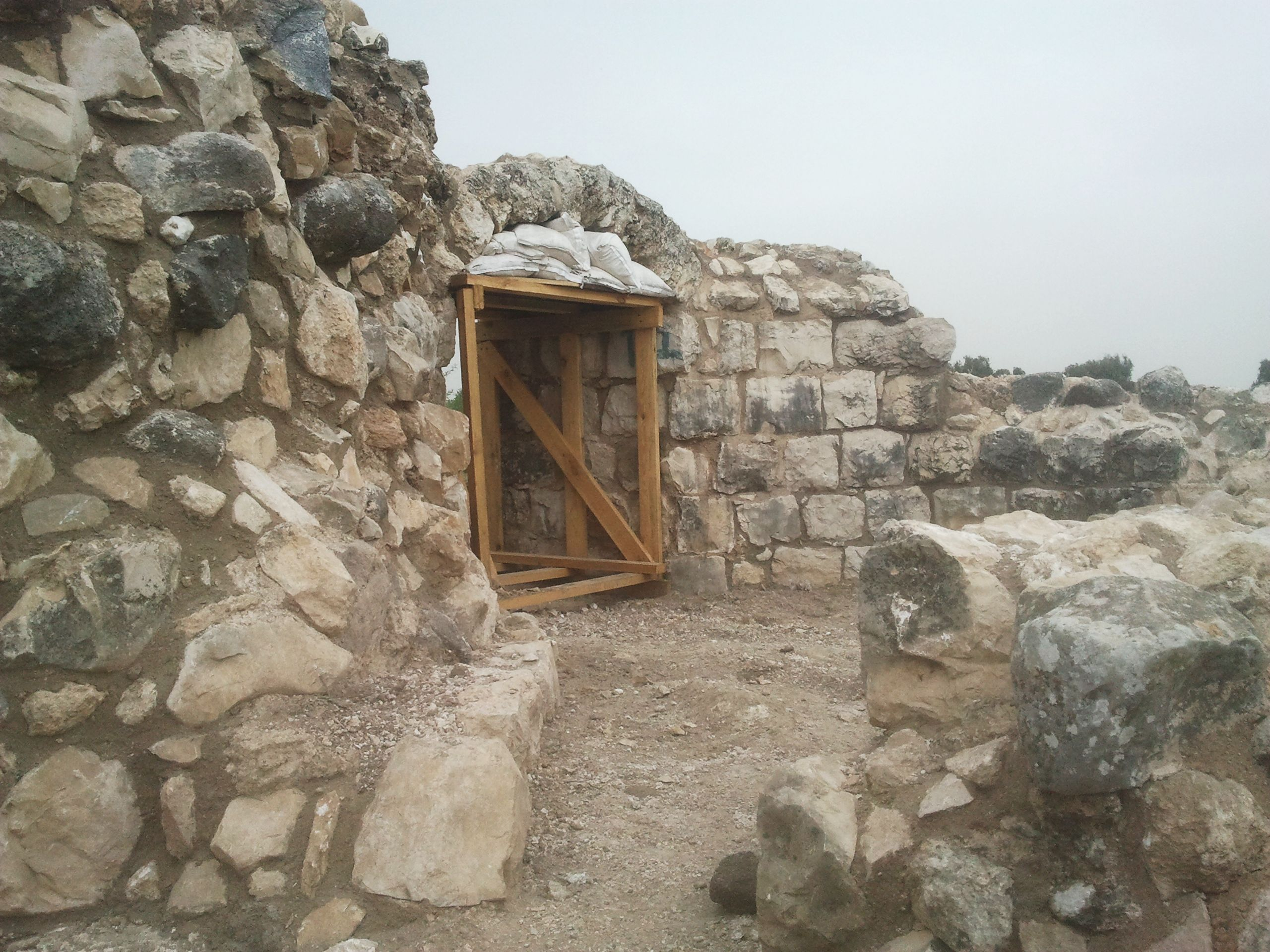 חנוֹת תגרים (חאן אל תוג'אר) - שרידי חאן (אכסניה) ממלוכי גדול, בגליל התחתון, מול הכניסה לקיבוץ בית קשת, על נתיב דרך הדואר הקדומה. החאן היה בנוי סביב חצר מרכזית ובה באר. החאן כלל מסגד מפואר ממנו נותרו שרידי שלושה צריחים. מכלול החאן מוקף חומה שייתכן שהיא מאוחרת, רק מן המאה ה-16. שמו של החאן מעיד על השוק שהתקיים סביבו (תגרנים = סוחרים).